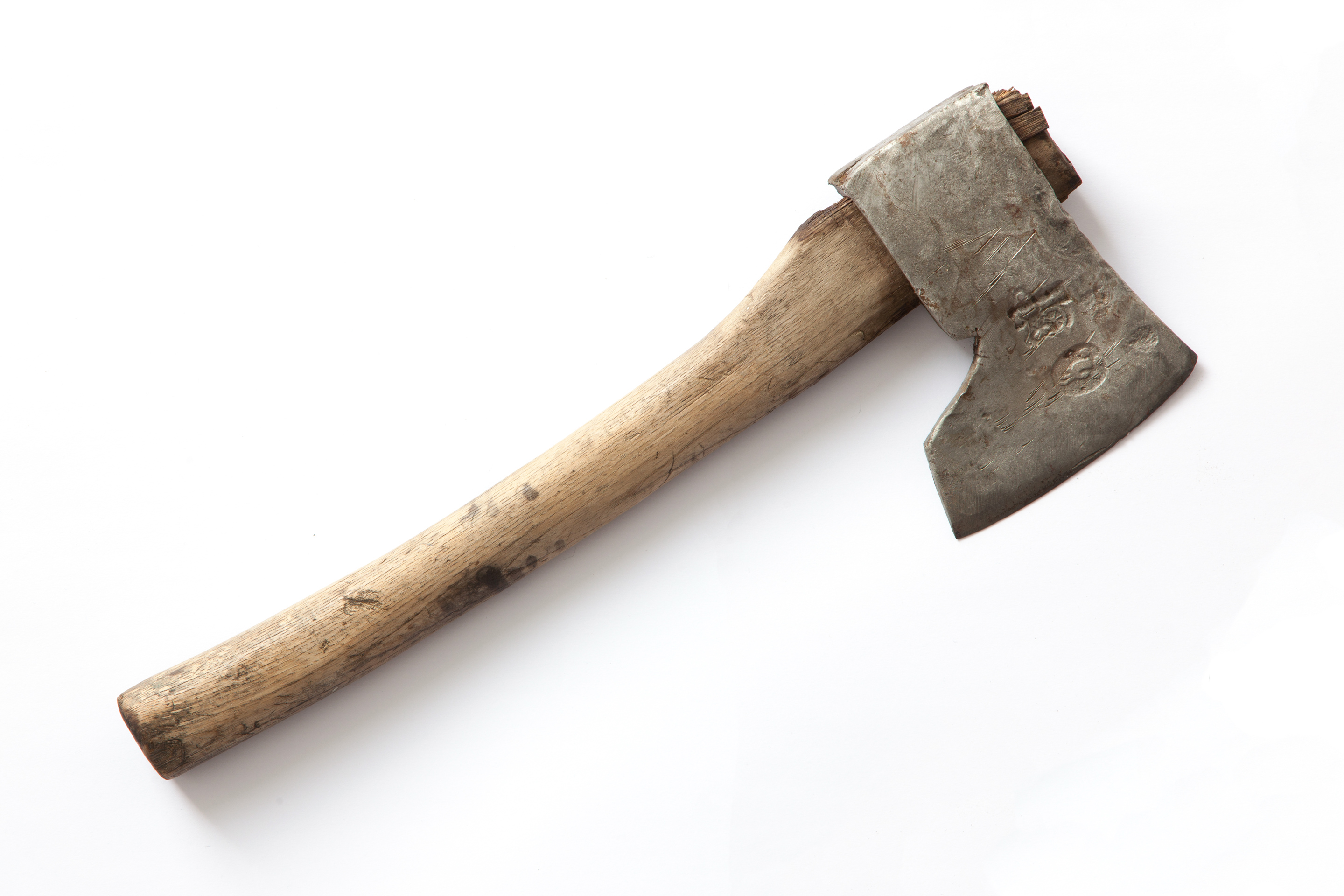 In der Hammerschmiede Inzersdorf produzierte Hacke mit den Zeichen Kanone (Sensenschmiede Blumau) und Gamskopf mit drei Kreuzen (Sensenschmiede an der Zinne); 2. Hälfte 19. Jahrhundert.